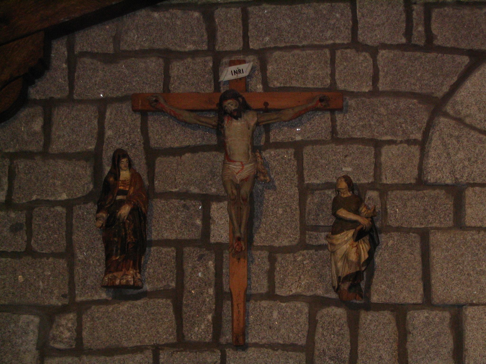 Calvario de la Ermita de la Virgen de la Encina, Macotera